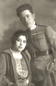 Antonio Callea (1894 – 1939) con la moglie.